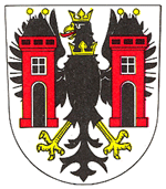 Byšice - znak obce.